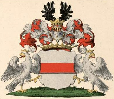 Manteuffeli suguvõsa krahvivapp